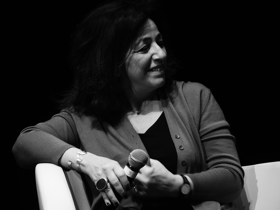 Georgia Makhlouf - Escapades littéraires 2016